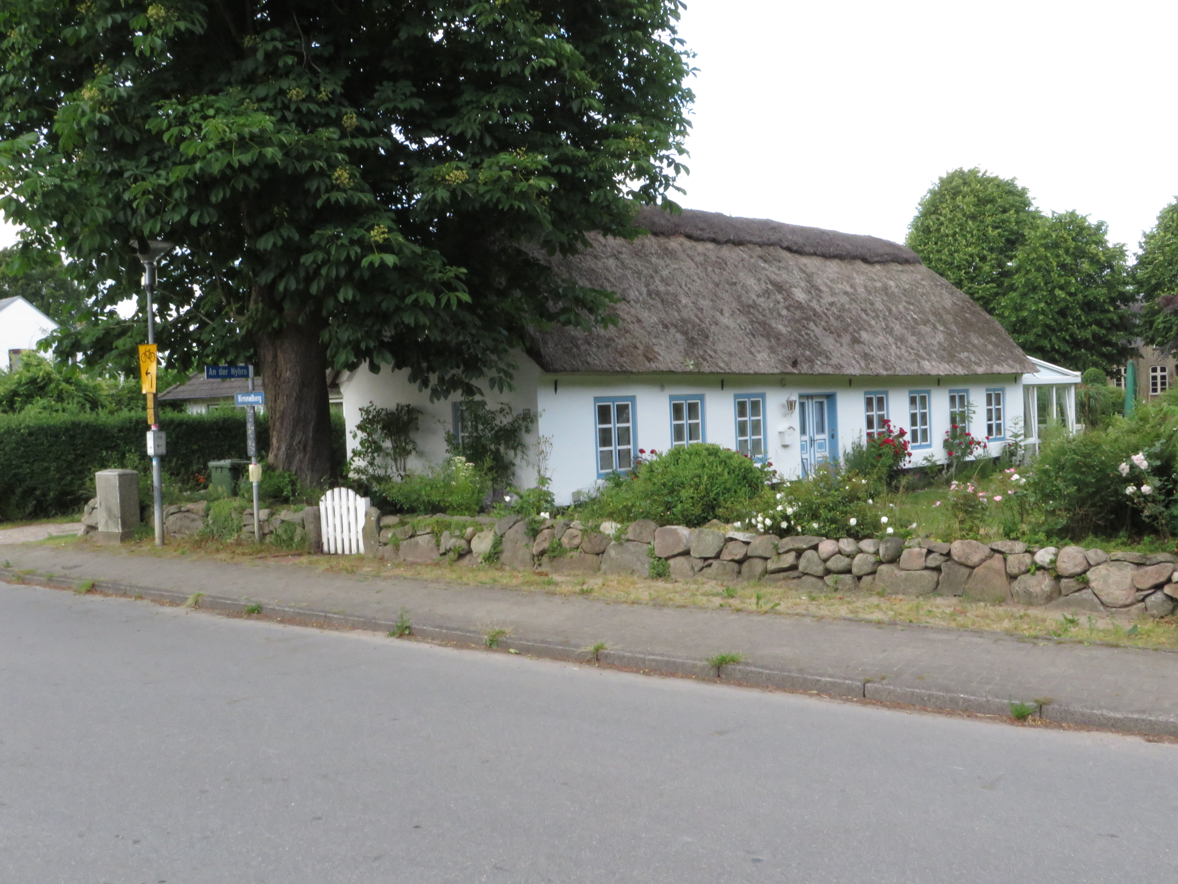 Reetdachhaus in der Straße Himmelberg, Tastrup 2014